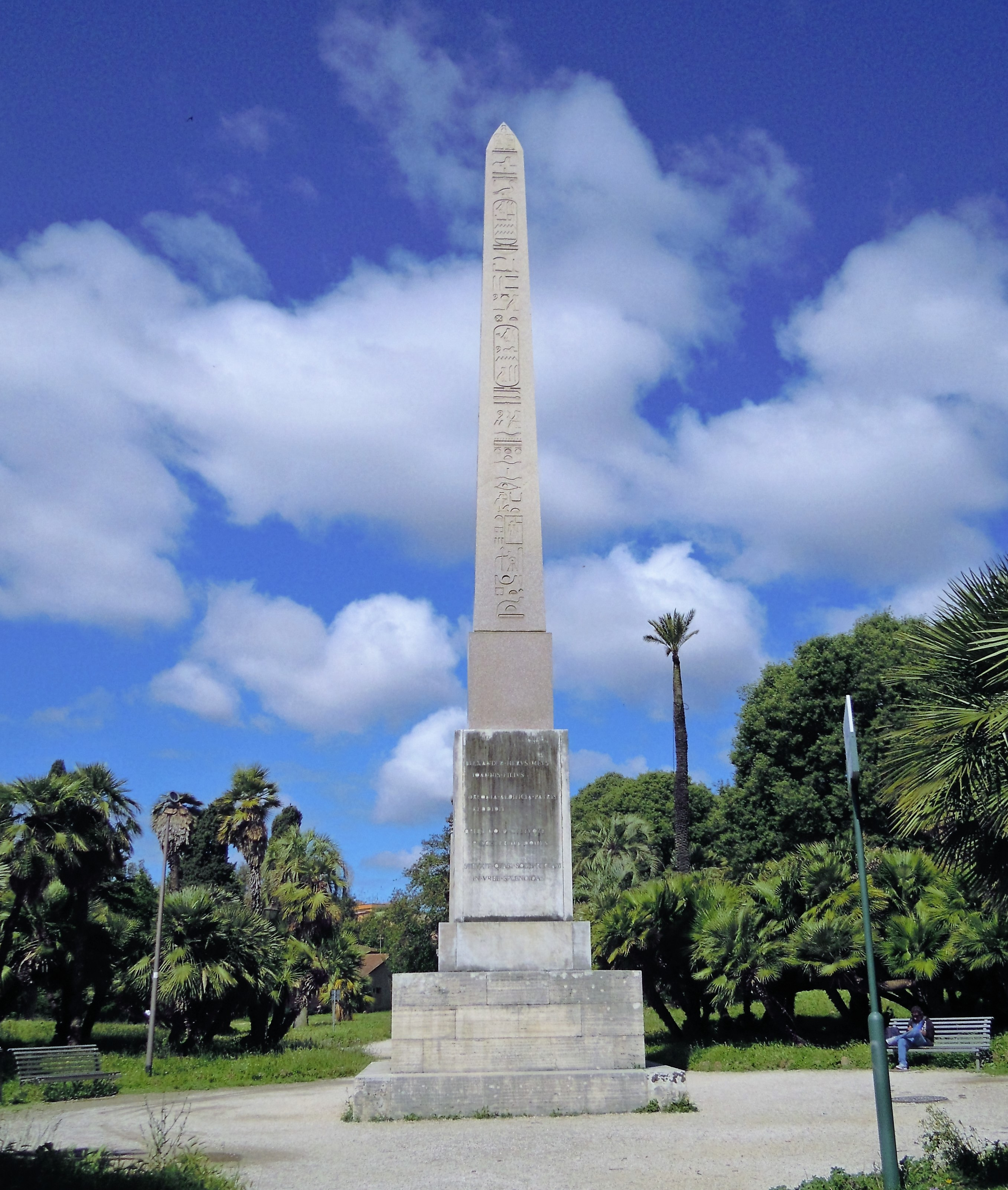 Roma, Villa Torlonia - obelisco dedicato ad Anna Maria Schultheiss, madre di Alessandro Torlonia